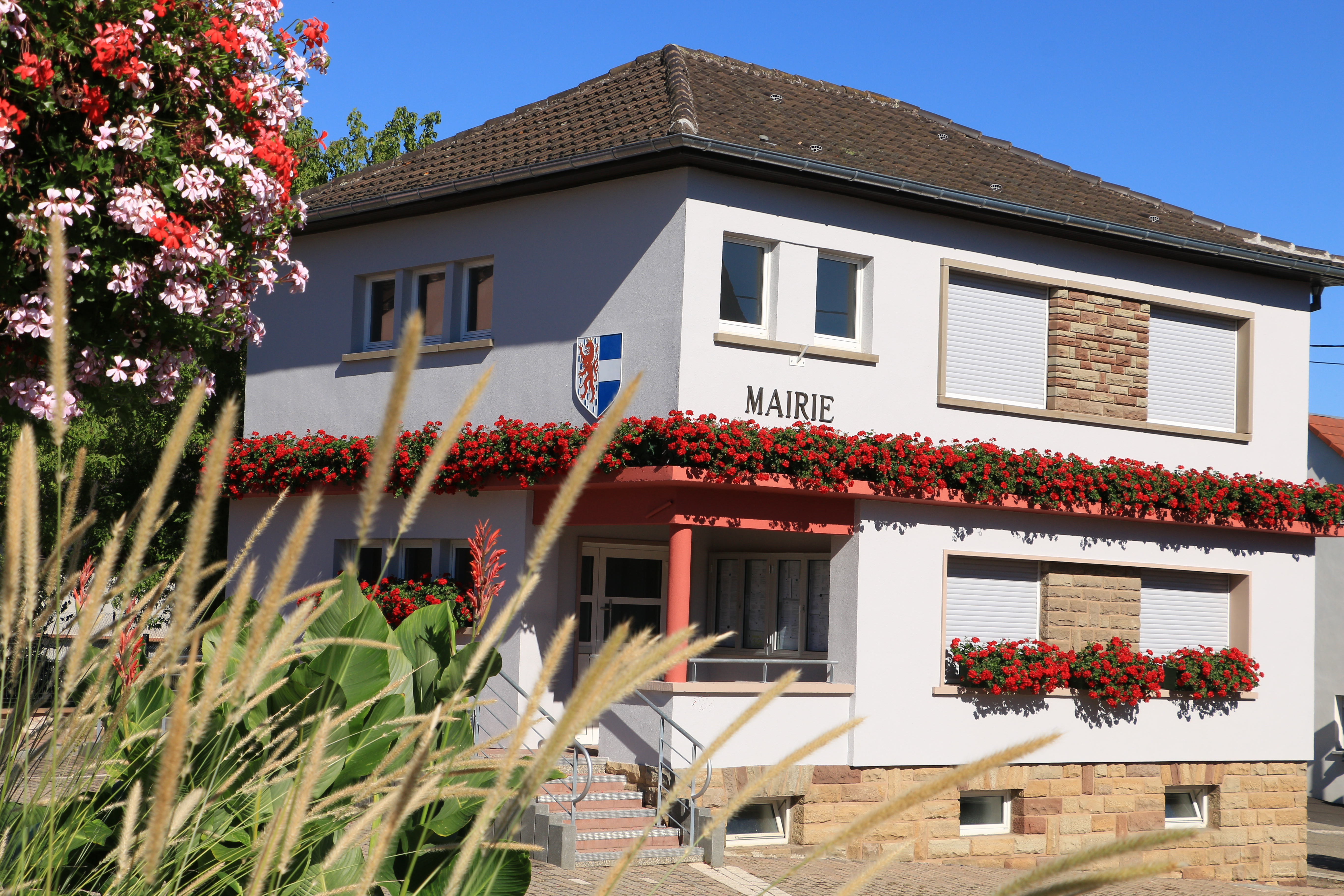 Mairie - 1, rue Principale